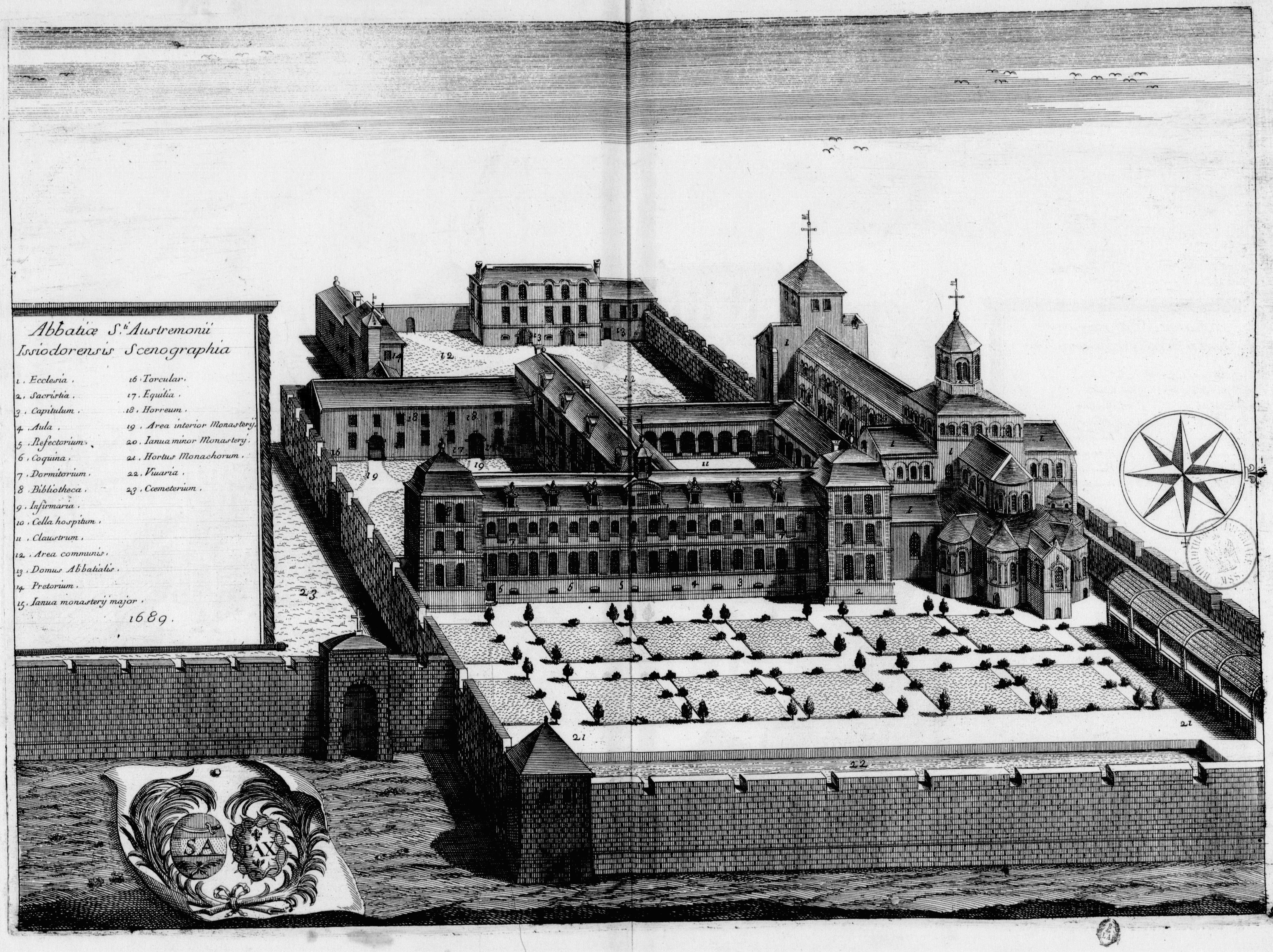 Abtei Saintr-Austremoine s'Issoire, Druckgrafik vor 1789.